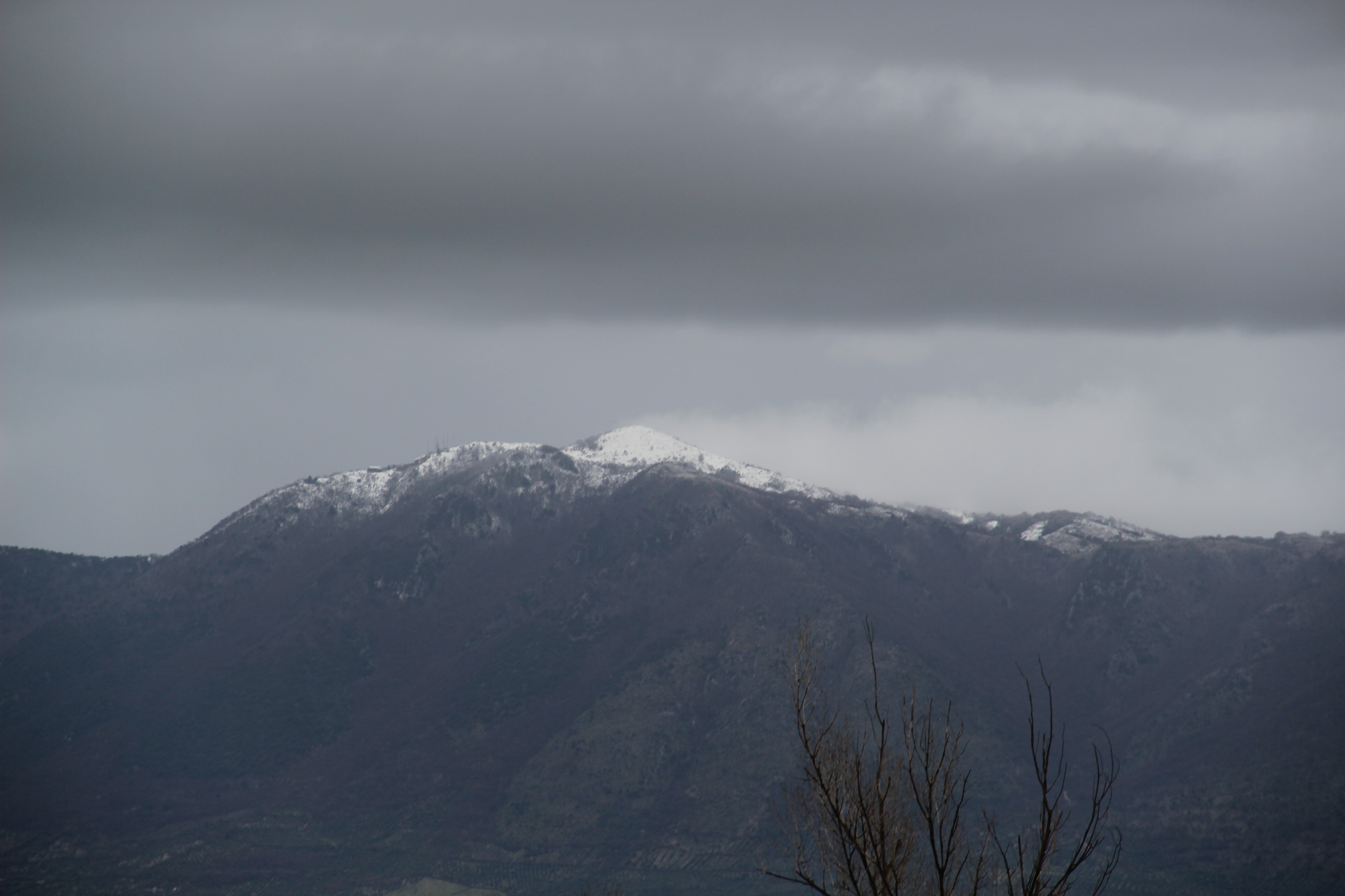 Monte Zappi visto da circa 15 km di distanza dopo una nevicata marzolina.